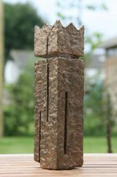 De Trofee van het Belgisch kampioenschap kubb